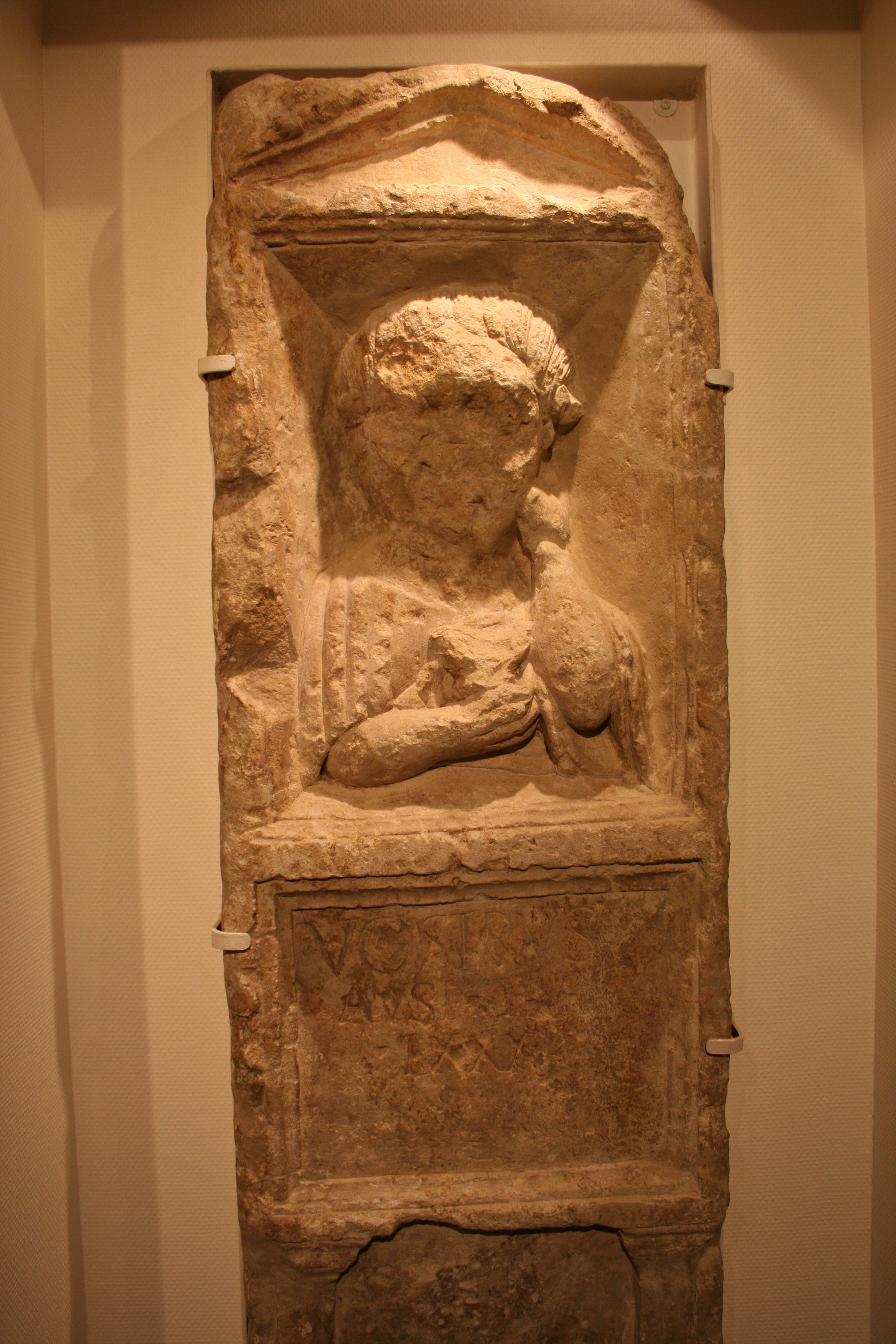 Stèle de Vostrus. Lisieux, France. CIL XIII, 3180: Vostrus/ Ausi f(ilius) v(ixit) a(nnos)/ LXXX